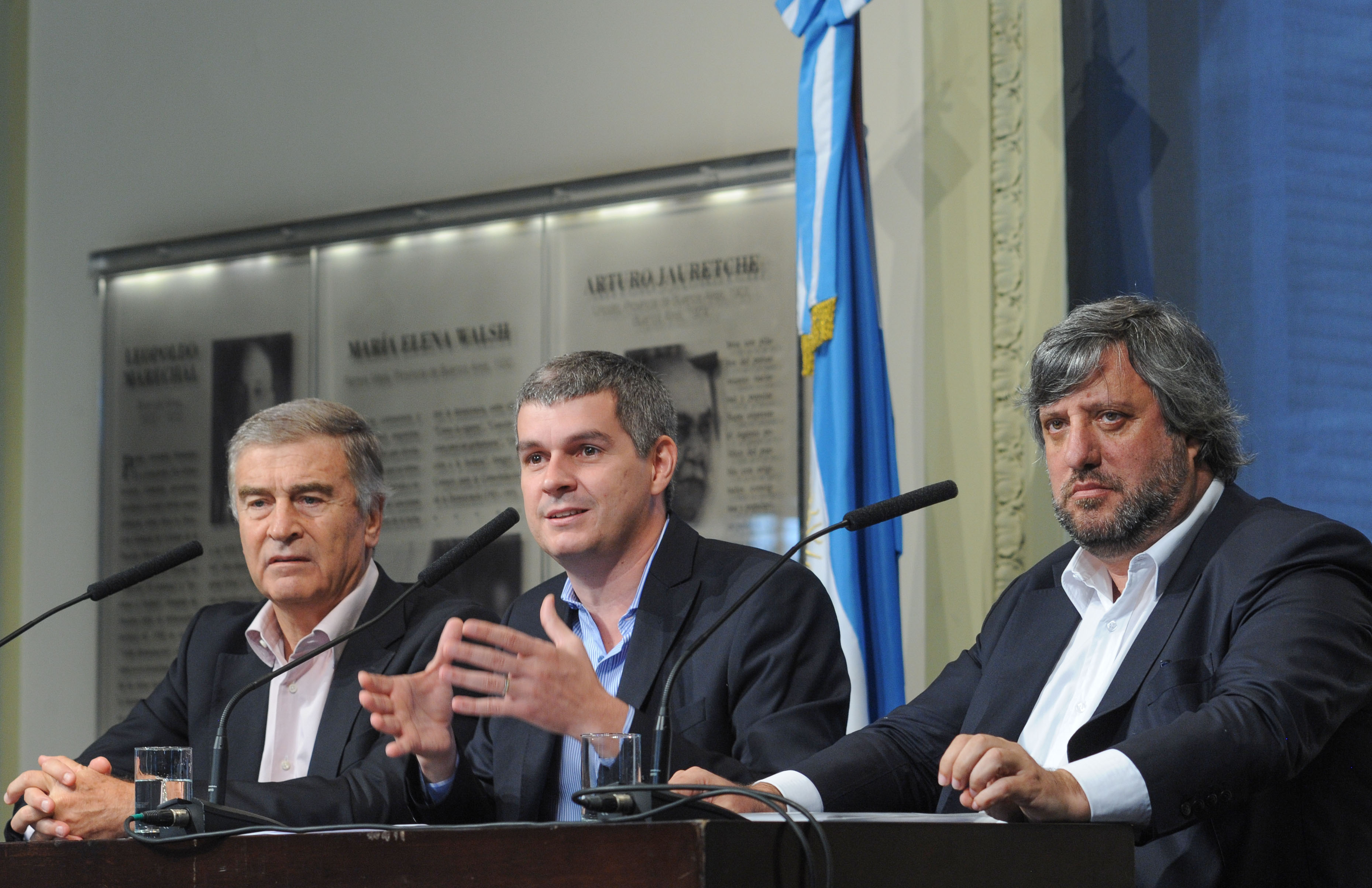 El Jefe de Gabinete, Marcos Peña, anunció en conferencia de prensa la creación del Ente Nacional de Comunicaciones (ENACOM), que estará a cargo de Miguel de Godoy. El nuevo organismo unificará las funciones de la Autoridad Federal de Servicios de Comunicación Audiovisual (AFSCA) y la Autoridad Federal de Tecnologías de la Información y la Comunicación (AFTIC). Además, el funcionario anunció la creación de una Comisión Bicameral para el análisis, el debate y la redacción de una nueva Ley de Comunicaciones.